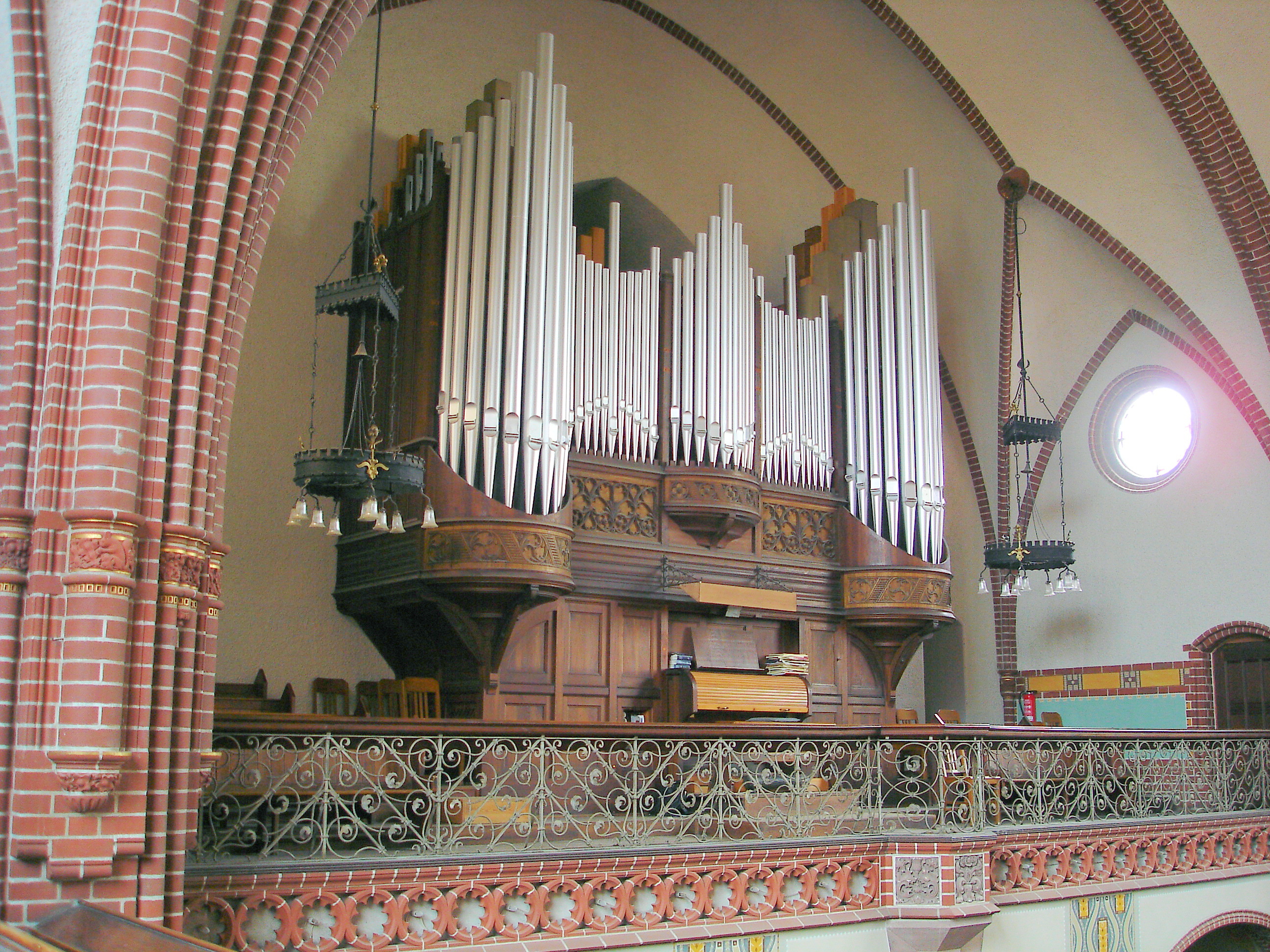 Orgel der Heilig-Geist-Kirche in Rostock